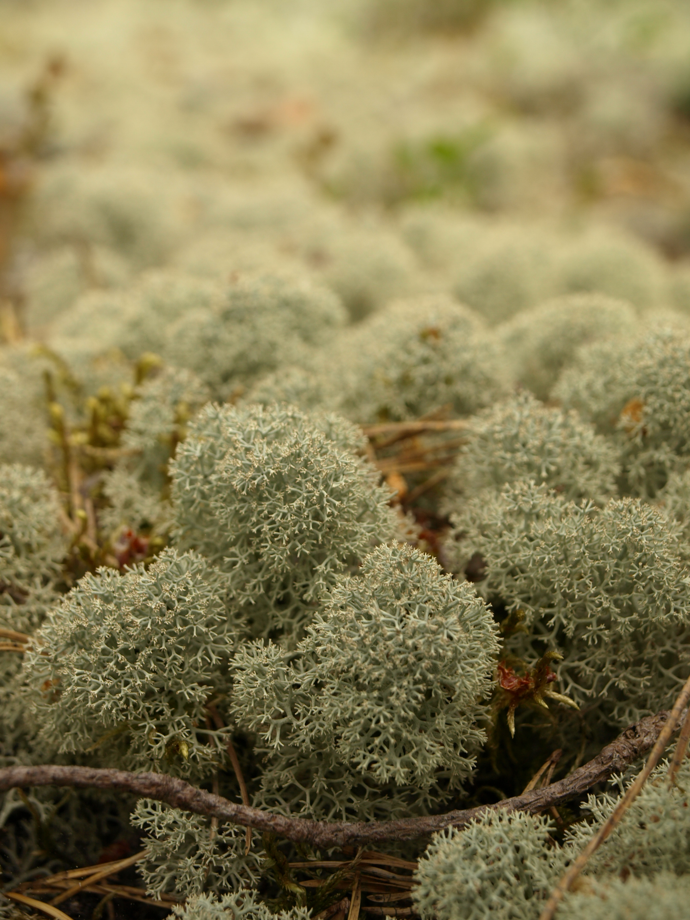 Alpi põdrasamblik